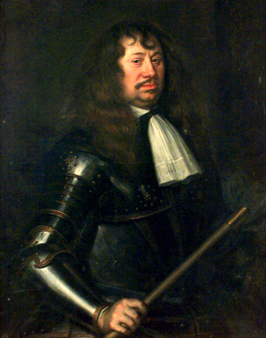 Estonian: „Carl Gustaf Wrangel, Rootsi väejuht ja riigitegelane“label QS:Let,"Carl Gustaf Wrangel, Rootsi väejuht ja riigitegelane"